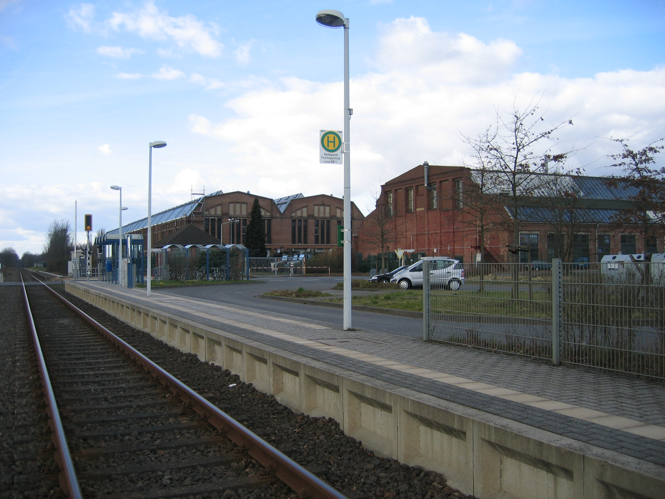 Haltestelle Jülich Forschungszentrum an der Bahnstrecke Jülich–Düren.